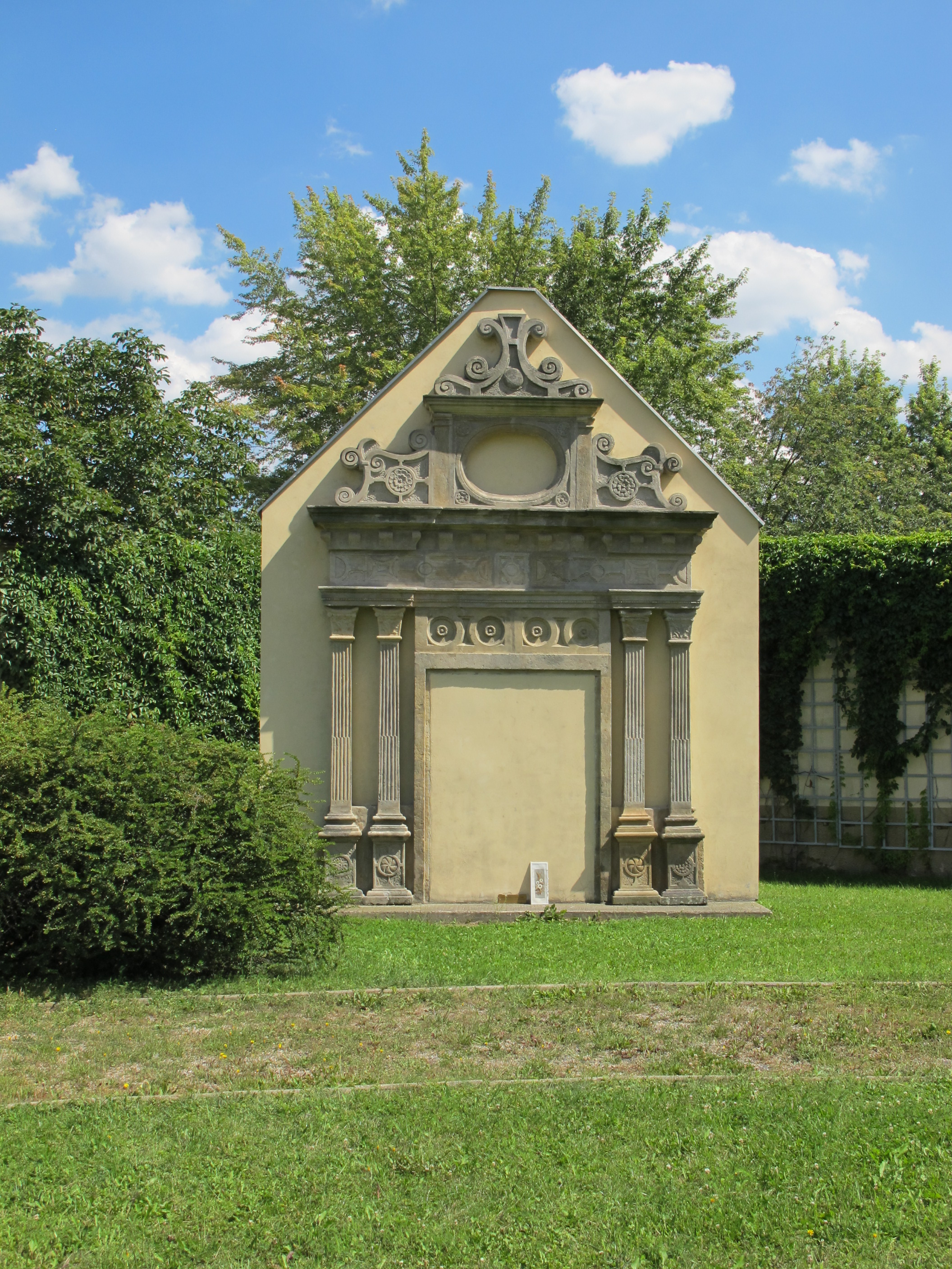 Portál zbořeného kostela sv. Václava v Mostě, 1. polovina 17. století, umístěn u kostela Nanebevzetí Panny Marie v Mostě